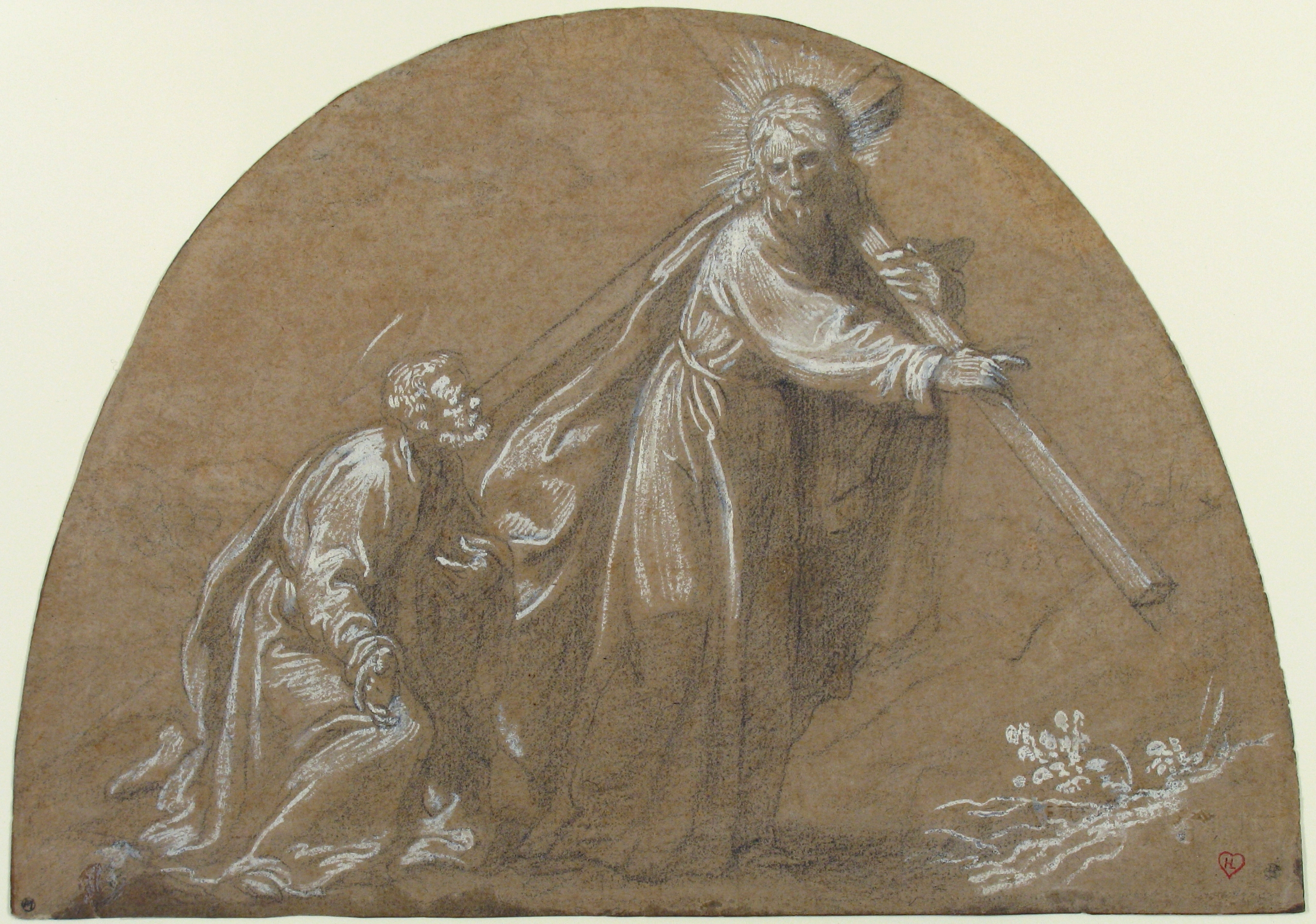 Drawing; Drawings